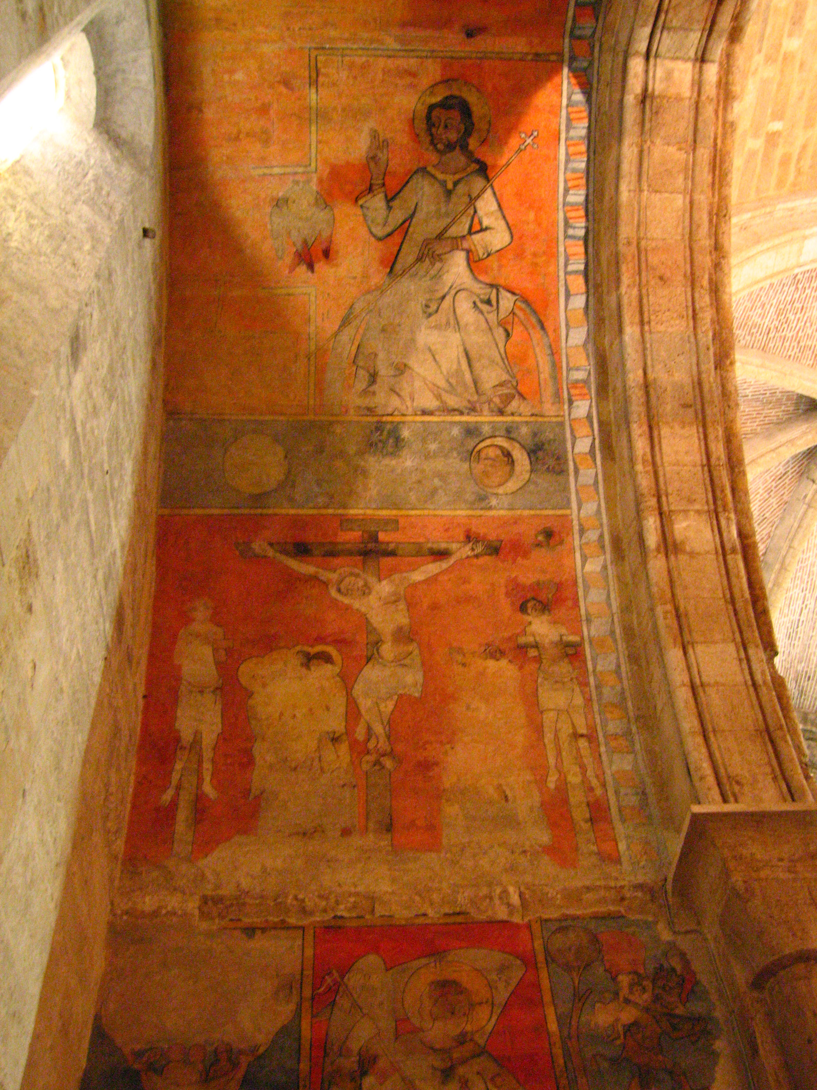 Sant Joan de l'Hospital (València). Capella amb pintures romàniques